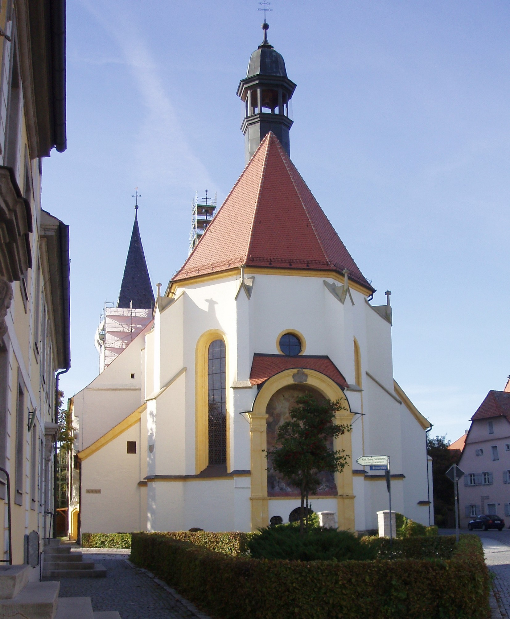 Stiftskirche Herrieden